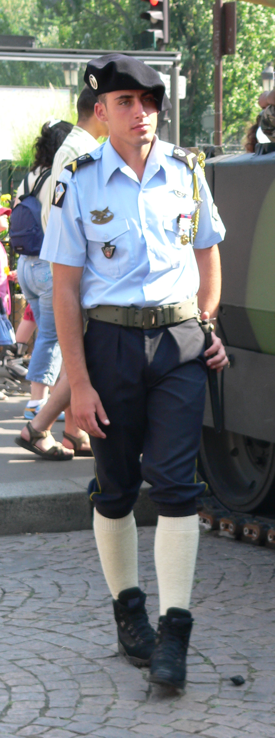 Chasseur Alpin. Military parade, Avenue des Champs-Élysées (Paris), 14 July 2006